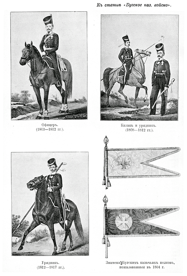 Данное изображение было использовано в статье «Бугское казачье войско» опубликованной в пятом томе «Военной энциклопедии», который был издан книгоиздательским товариществом Ивана Дмитриевича Сытина в 1911 году в столице Российской империи городе Санкт-Петербурге.